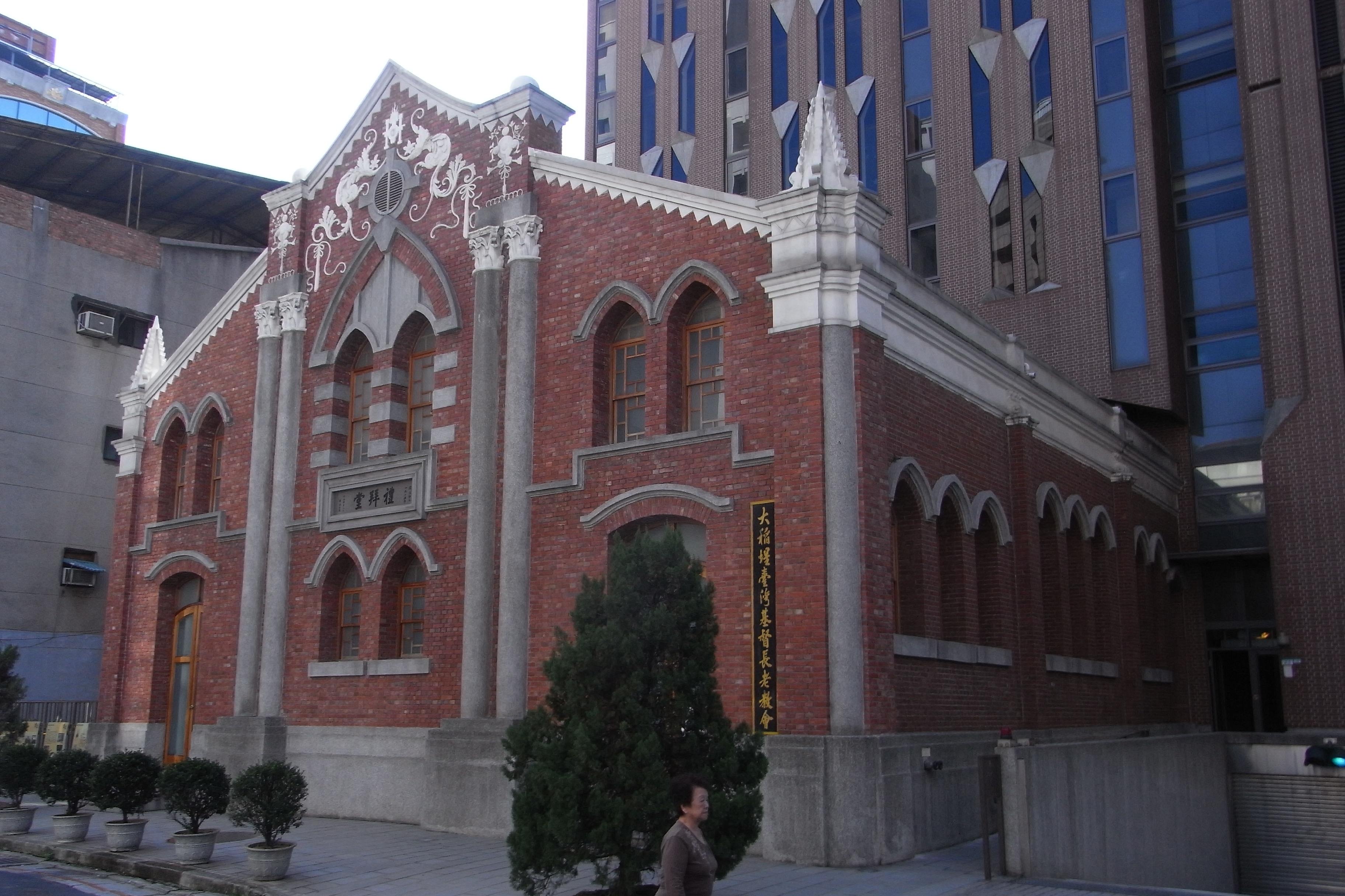 台灣基督長老教會大稻埕教會，位於臺北市大同區甘州街40號。